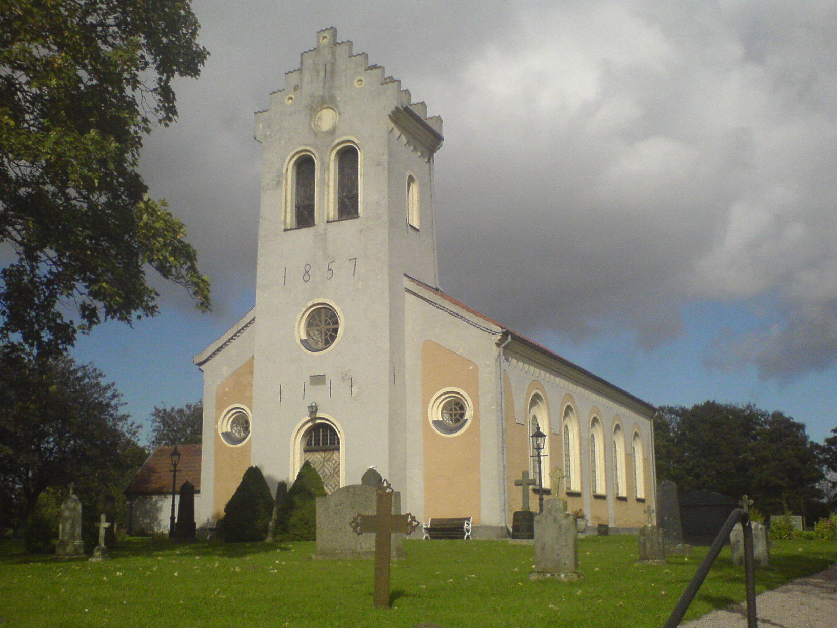 Hörröds kyrka